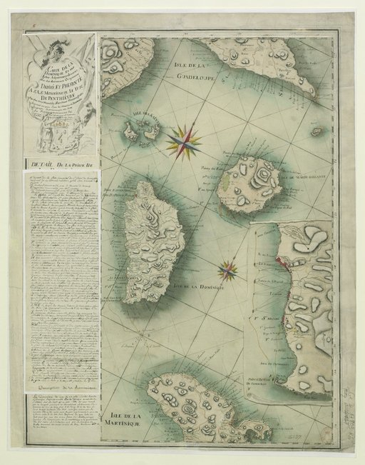 Jean-Henri Hassenfratz (1755–1827) – Carte de la Dominique et des Isles adjacentes dressés sur des documents origineaux. Document cartographique dédiée et présentée à S.A.S. Monseigneur le Duc de Penthièvre par son très humble serviteur Hassenfratz, aspirant au Génie, élève du Chevalier de Beaurain, géographe et pensionnaire du roy. L’ensemble de la carte résulte d’un collage des différentes parties géographiques. Le cartouche et les textes sont manuscrits. – Le titre est dans la marge, en haut et à g., dans un cartouche ornemental, aux armes du dedicataire décoré de figures allégoriques. – En carton : Attaque devant Le Roseau, La Dominique. Théâtre de guerre : Île de la Dominique, Roseau, (Saint-George, Dominique).